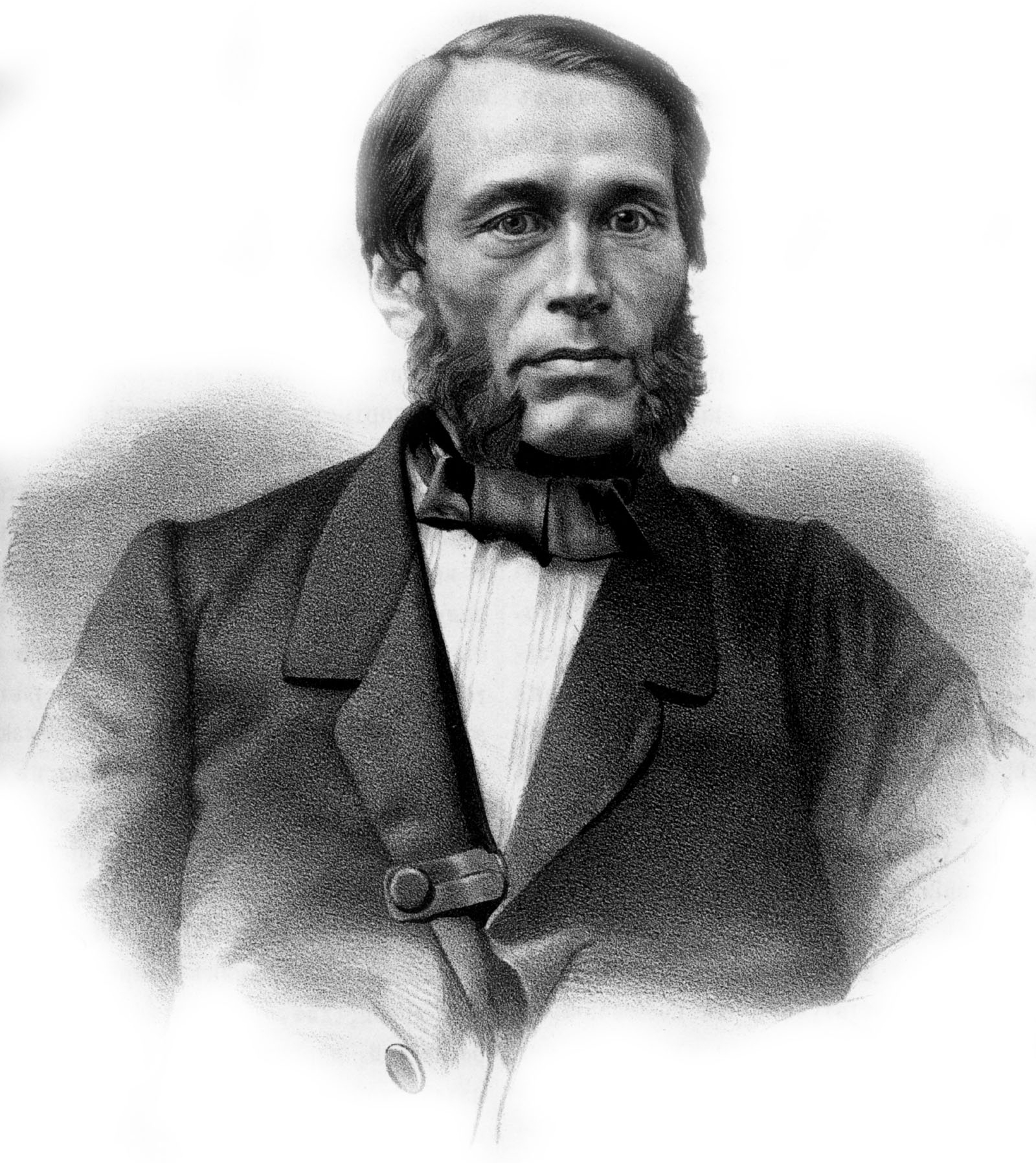 J. GROT. Съ фотографiи N.N. Лит. А. Мюнстера, СПБ. Imp. Lith. A. Munster (Editeur)